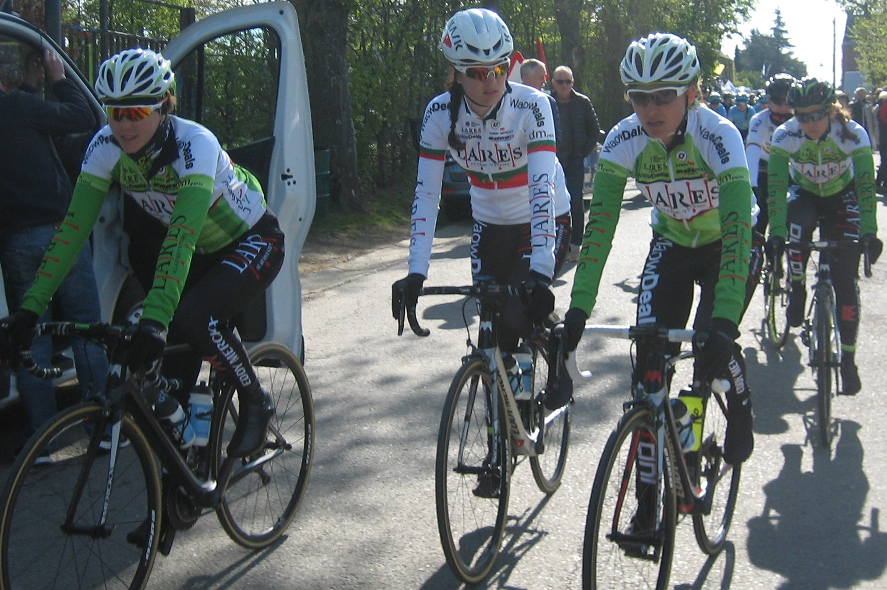 Start van de Waalse Pijl 2017 in Huy.